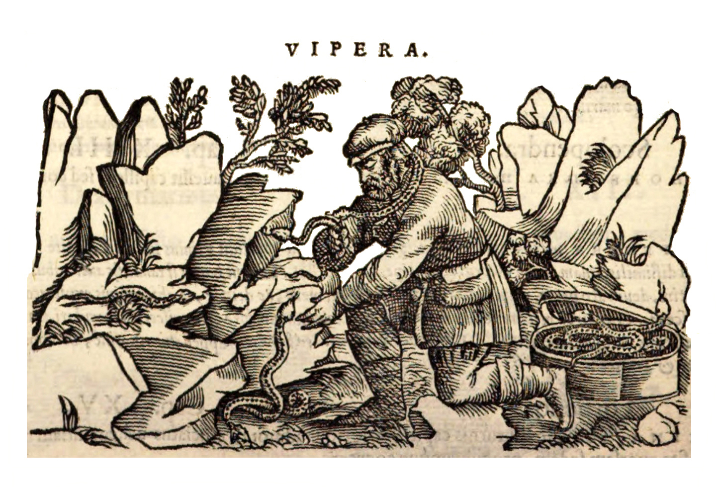 Vipern-Fänger